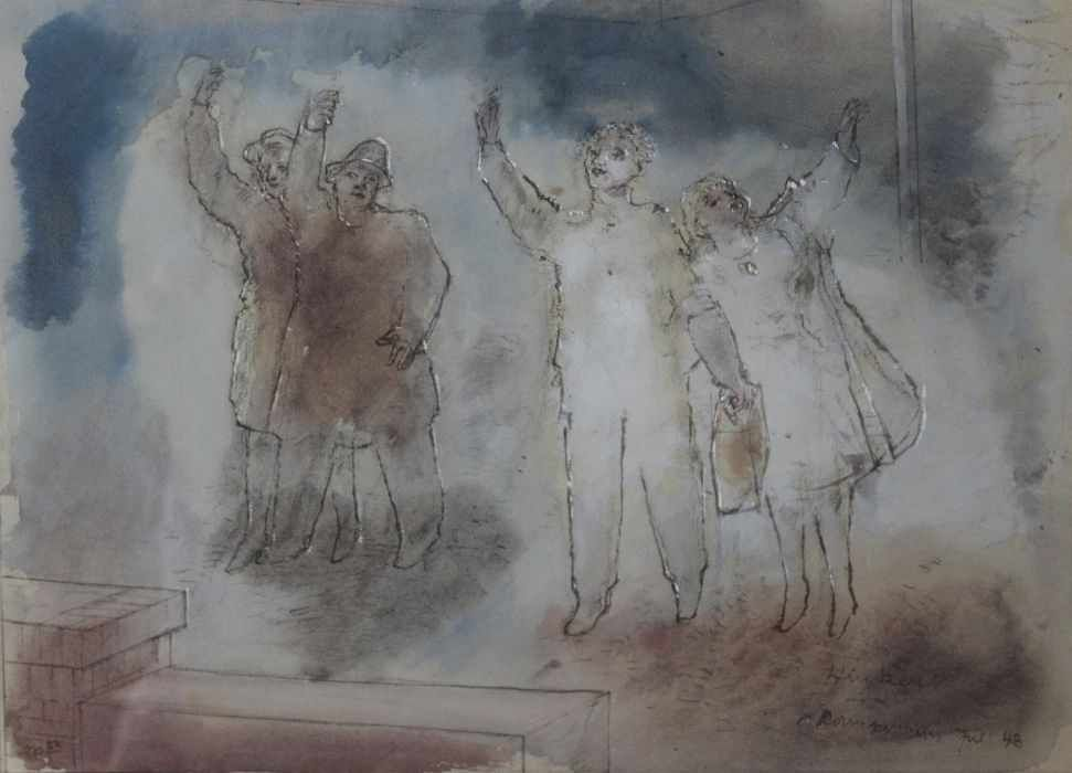 Aquarell "Winken", rechts unten signiert und mit Datum Juli 43 versehen. In der Sammlung Matthias Süß.